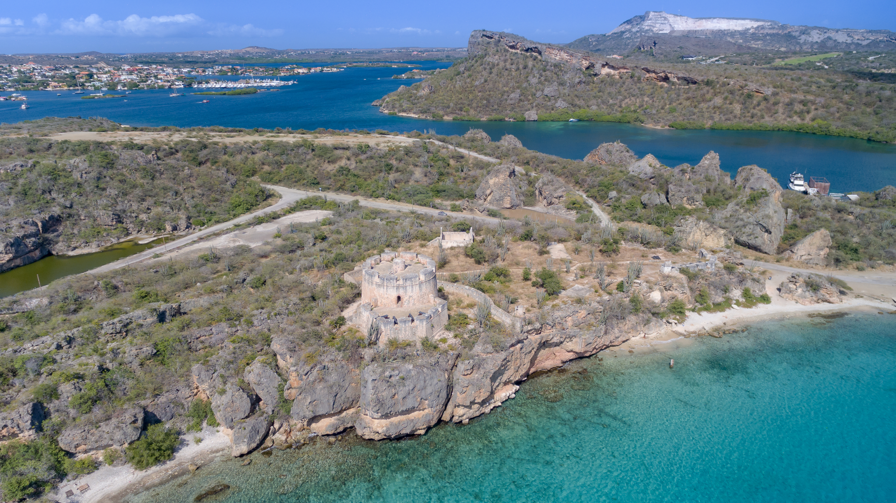 Fort Beekenburg Curacao Curacao